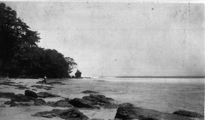 Foto. De kust van de Baai van Tjilaoeteureun nabij Pameungpeuk aan de zuidkust van West-Java